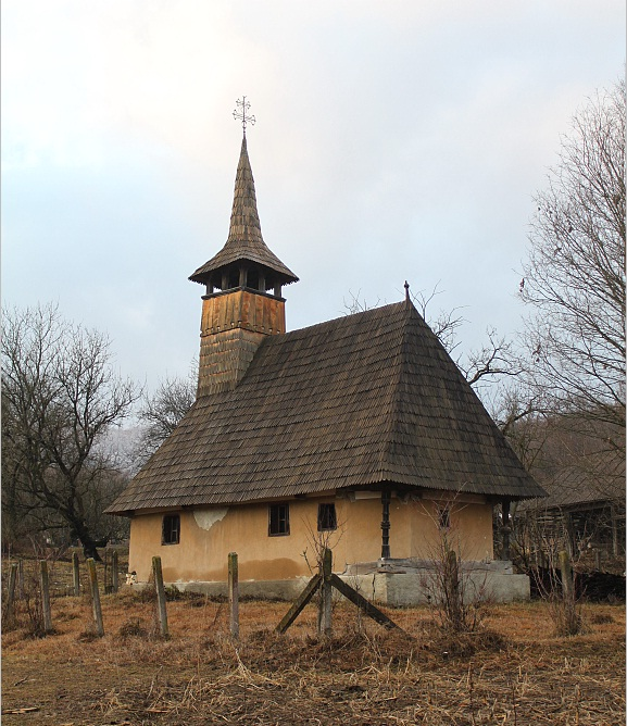 Biserica de lemn din Măleni, județul Sălaj.